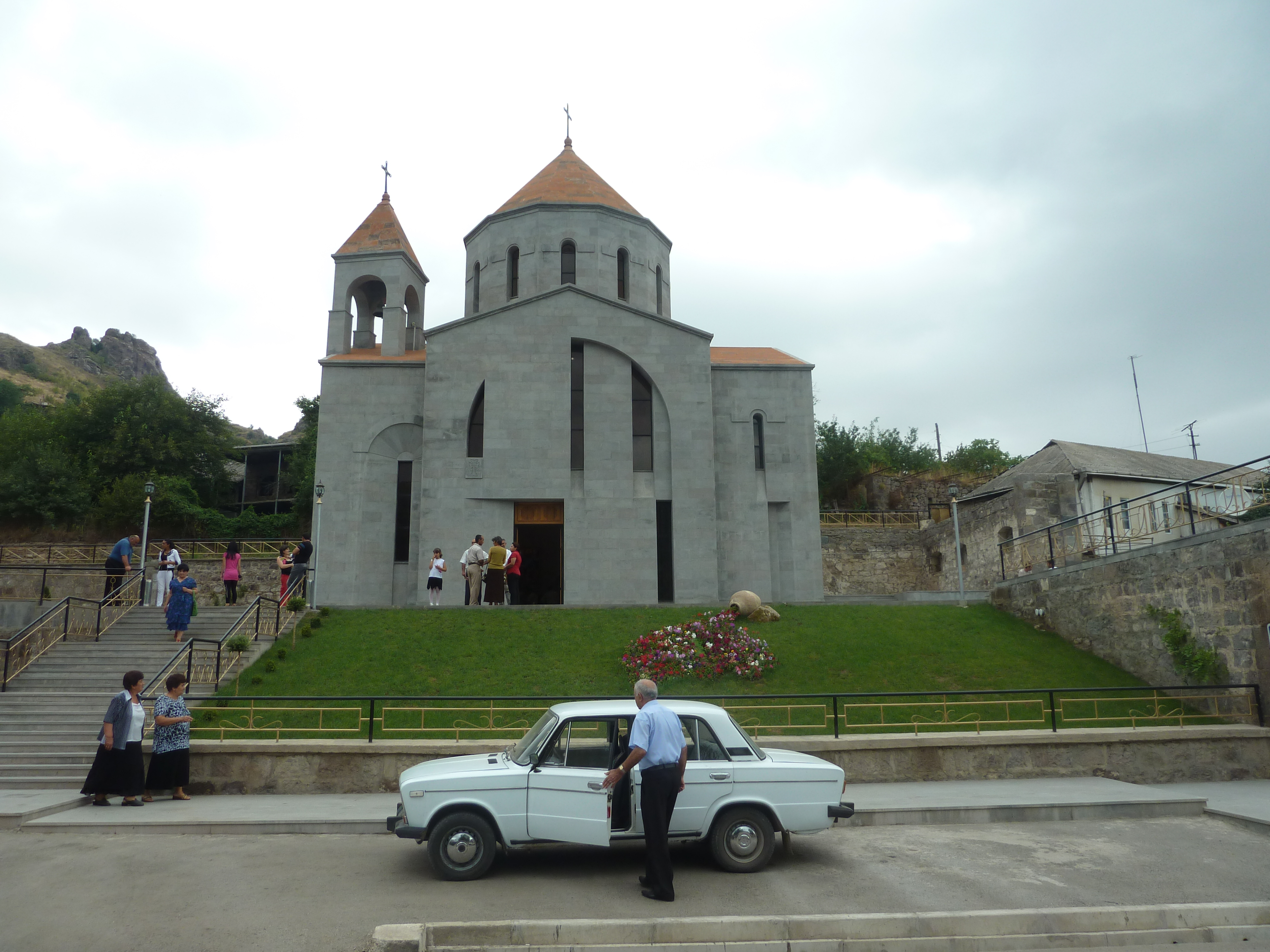 Հայաստանի Հանրապետության Տավուշի մարզի Մովսես գյուղում գտնվող Սուրբ Աստվածածին եկեղեցին հարավից